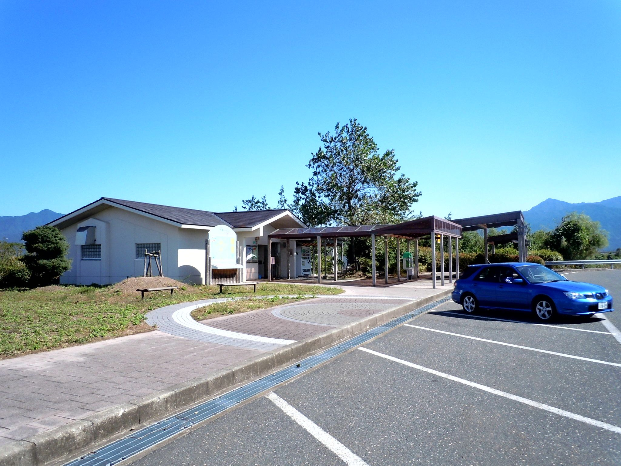 磐越自動車道 五泉パーキングエリア（上り線）